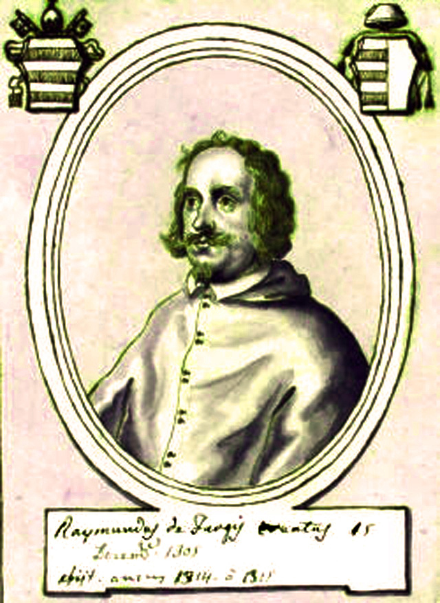 Cardinal Raymond-Guilhem de Fargues